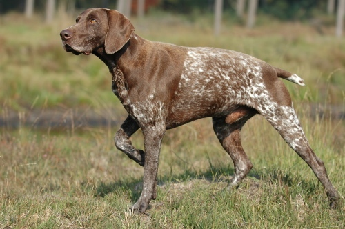 Duitse staande korthaar in typerende voorstaande houding.